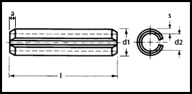 ISO 8752